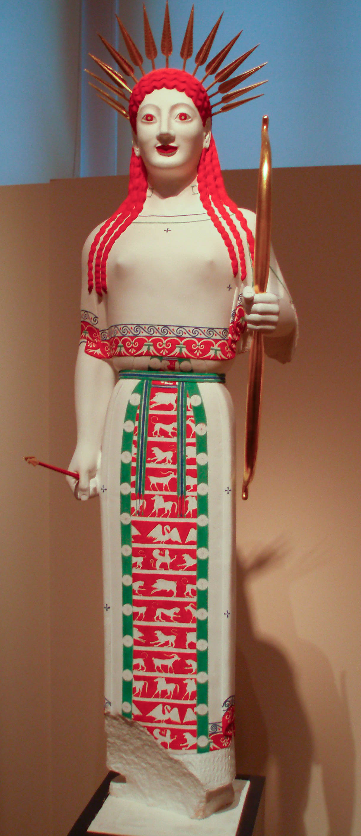 Restitution du décor polychrome de la Korè au péplos, vers 530-520, sous les traits de la déesse Artémis.(Original : Acropole d'Athènes (Inv. n°679). Exposition « Bunte Götter » dans la version montrée à Athènes.